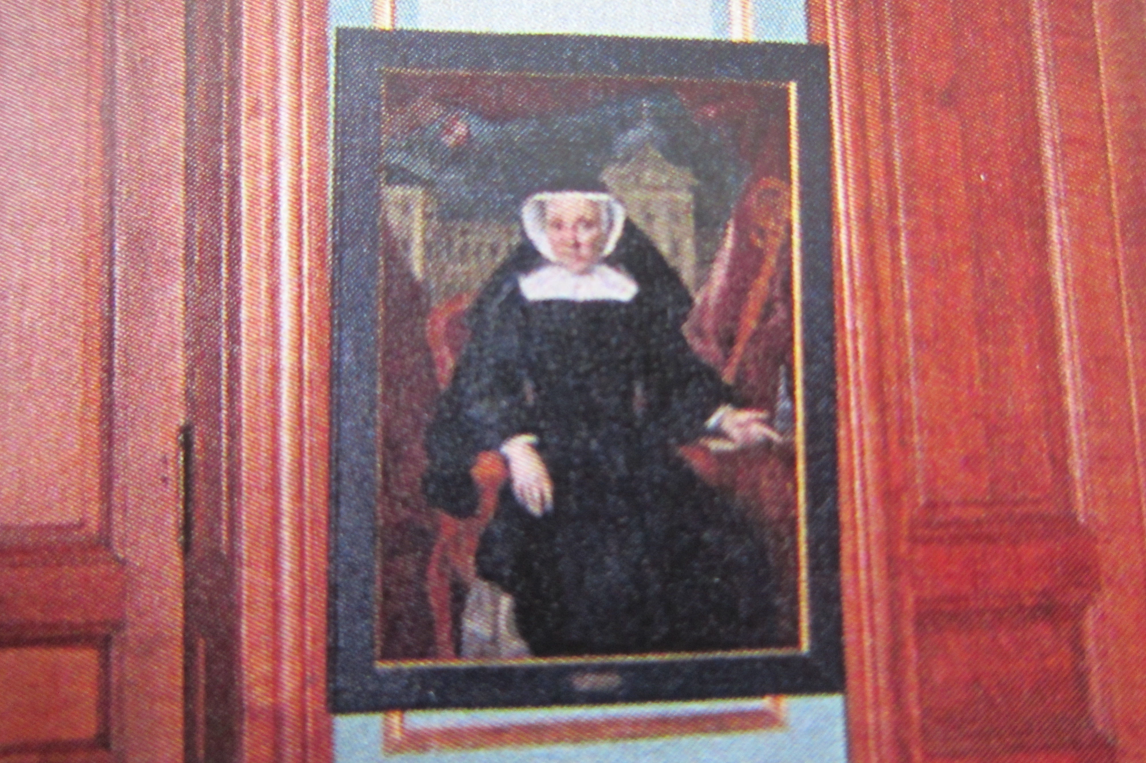 Portret abdis Augustina van Hamme in de Blauwe Zaal van de Abdij van Herkenrode, Kuringen, België